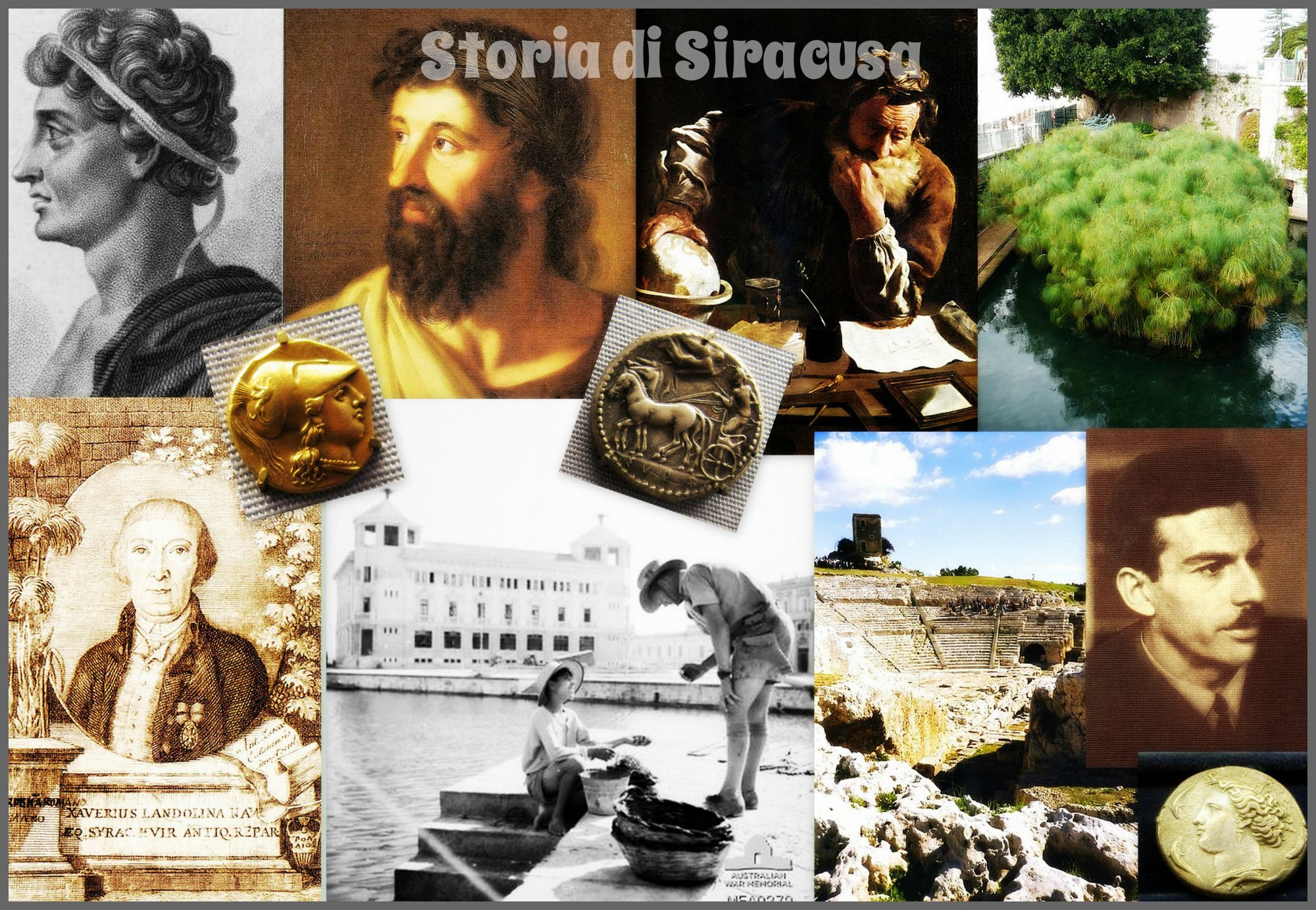 Collage di fotografie sulla storia siracusana, formato con immagini prese da Wikimedia Commons. Le licenze delle seguenti immagini e le relative attribuzioni sono visibili nelle seguenti pagine: File:0338 - Moneta di Siracusa (Aretusa) - Foto Giovanni Dall'Orto.jpg - File:Gelon I.jpg - File:Timoleonte g-patania.jpg - File:Syrakus, octobolo d'oro di agathokles, 304-289 ac. ca..JPG - File:Syrakus, tetradracma, 510-485 ac. ca.JPG - File:ANNI-DI-GUERRA-SIRACUSA--16-.jpg - File:Domenico-Fetti Archimedes 1620.jpg - [1] - File:Papyrus, Fonte Aretusa, Syracuse, Italy.JPG - [2] - File:Siracusa Teatro.jpg